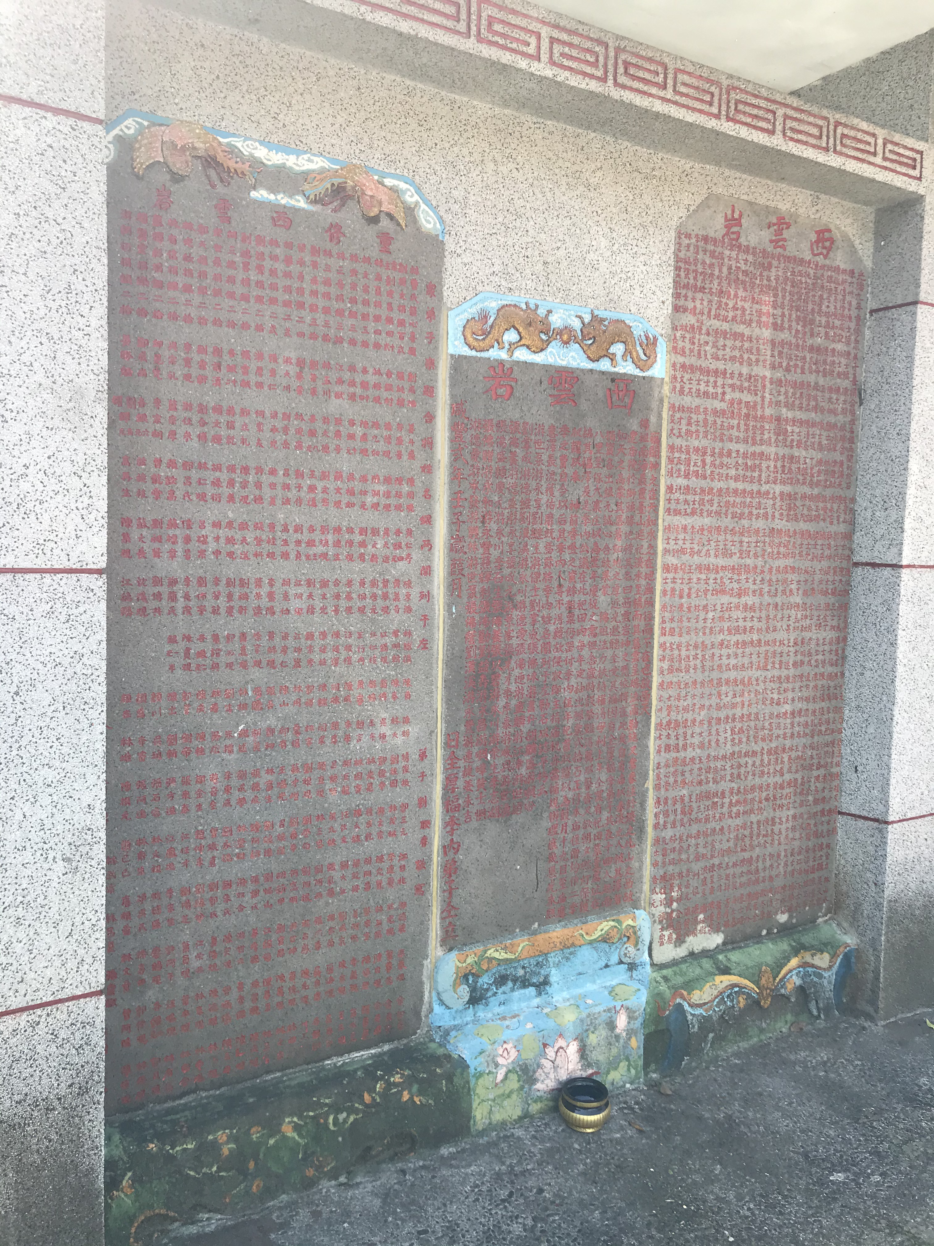 重修西雲岩捐題碑、捐置西雲岩佛祖香燈碑、西雲岩重修捐題碑記